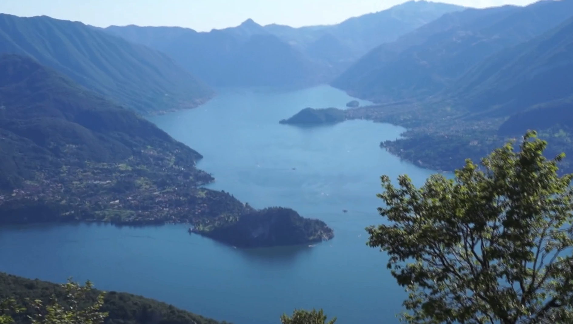 Screenshot di un video che ho girato a Perledo che immortale l'Isola Comacina